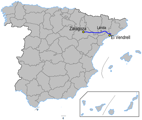 Mapa de la autopista AP2, Aragón y Cataluña